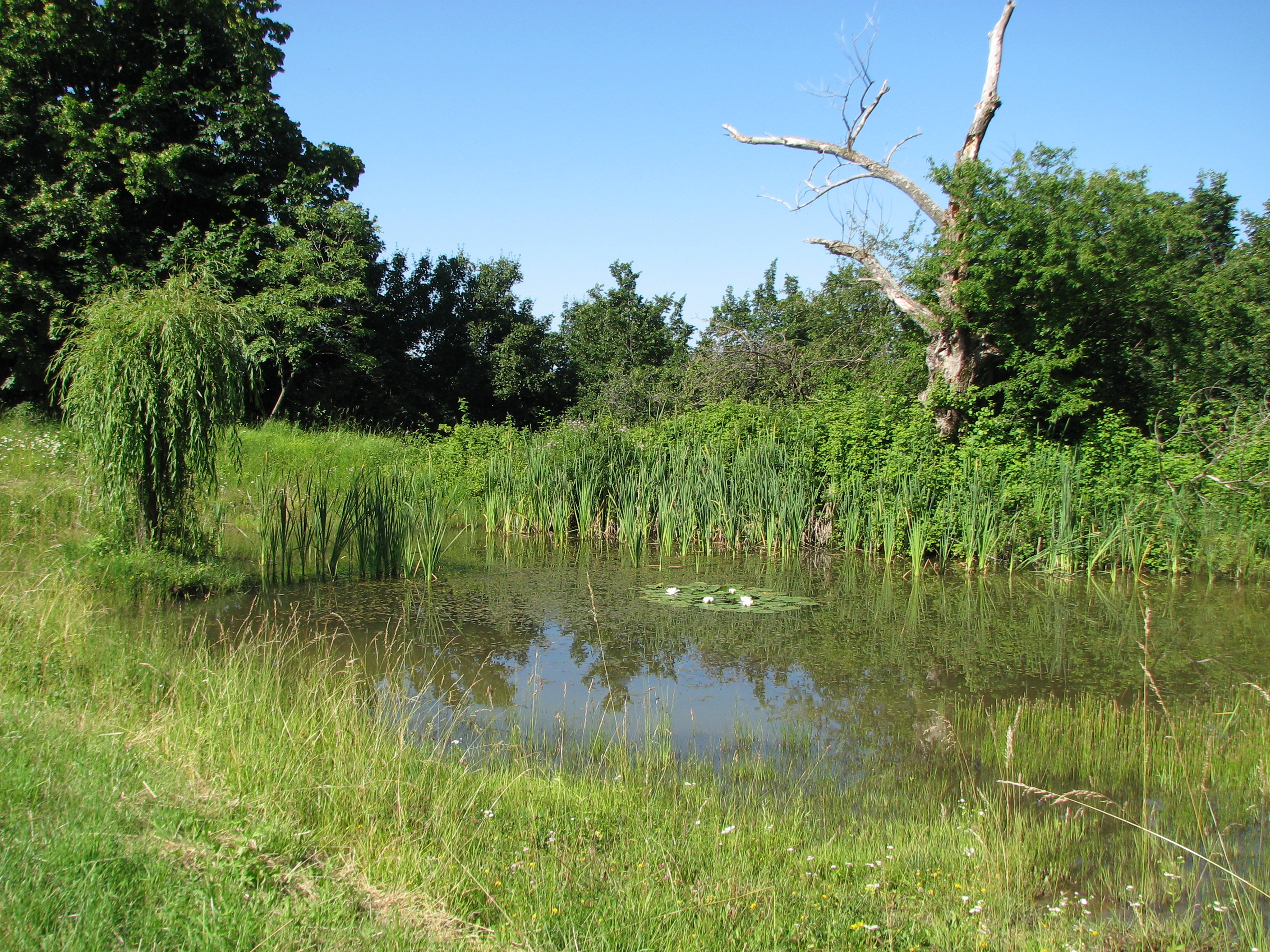 Kal pri cerkvi svete Ane nad vasjo Razguri; Slovenija, Primorska